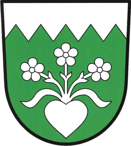 znak,Lesní Jakubov , okres Třebíč